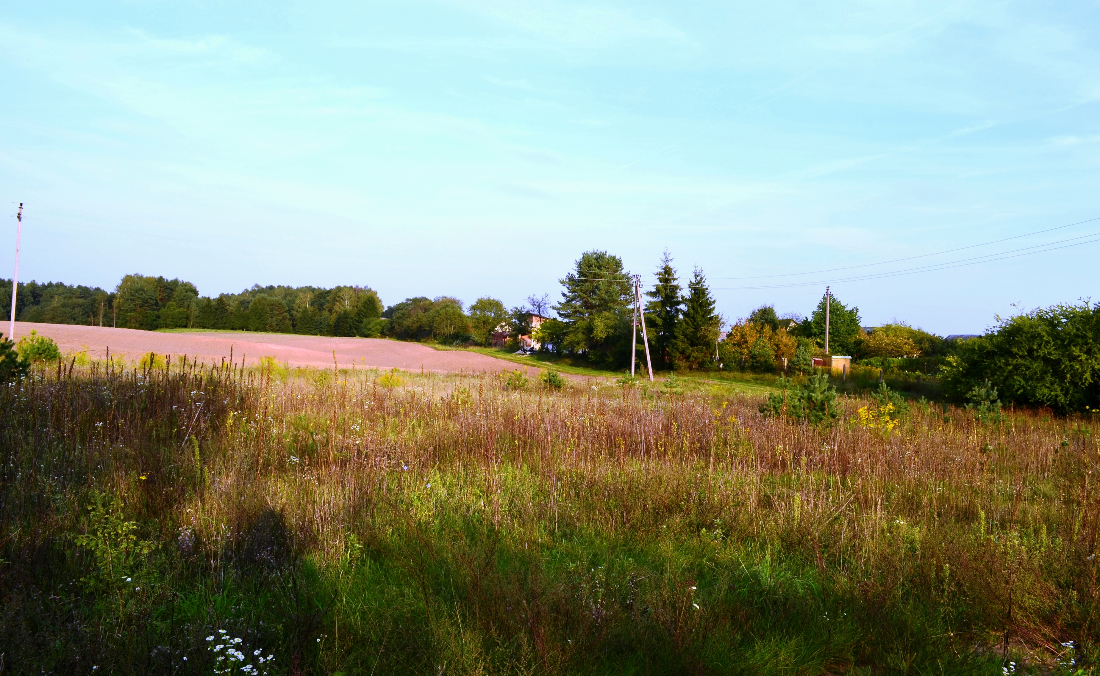 Krakiškės, Vilnius